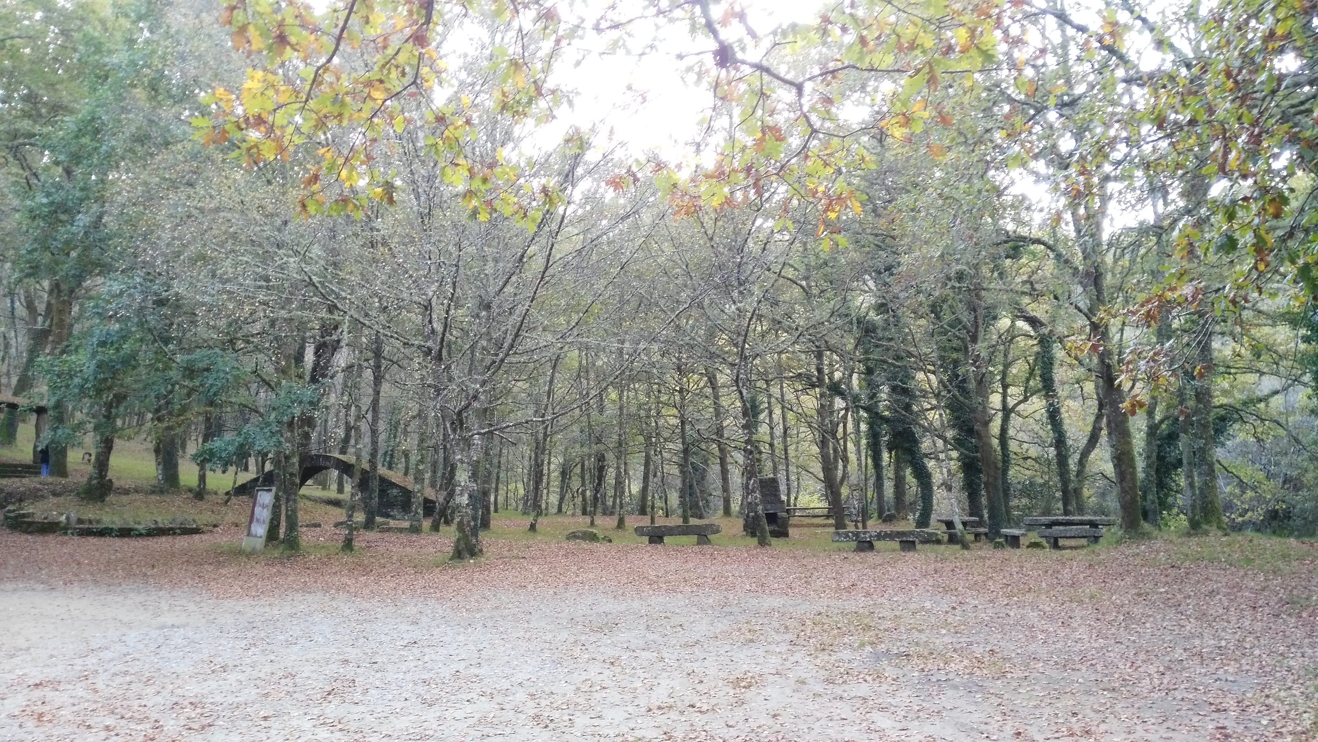 Área recreativa do Caneiro no lugar do Caneiro